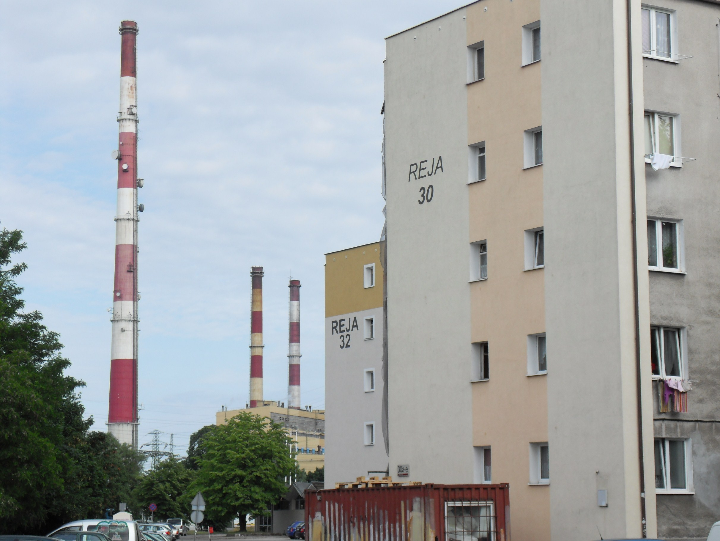 Gdańsk, osiedle Zielony Trójkąt i Elektrociepłownie Wybrzeże.